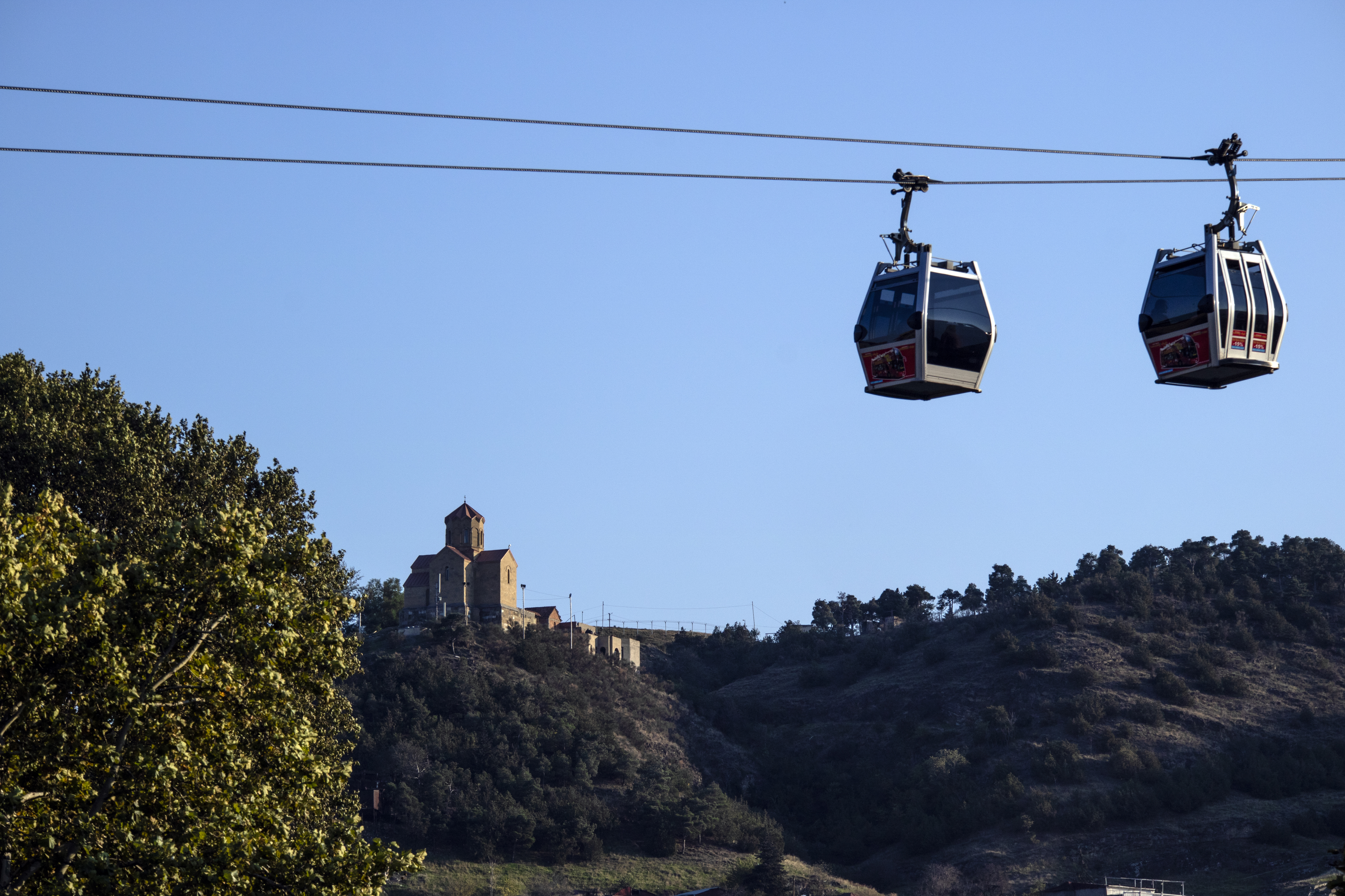 თაბორის ციხე, ყორჩი-ყალა — ფეოდალური ხანის ციხესიმაგრე და თანამედროვე ეკლესია თბილისში, ქალაქის ძველ უბანში, თაბორის ქედის ბოლოს, ბოტანიკური ბაღის თავზე. შემორჩენილია ციხის საძირკვლის ნანგრევები.